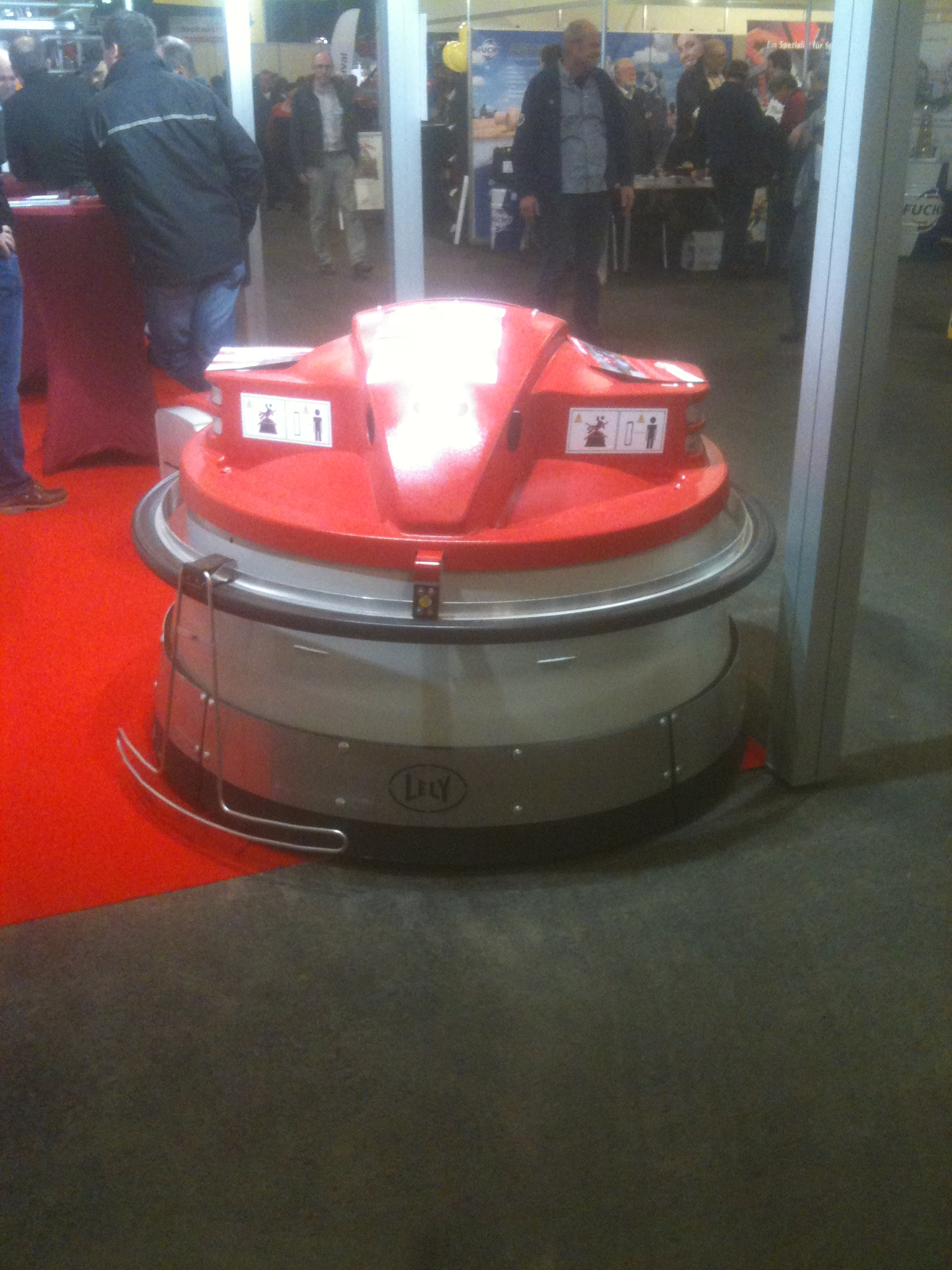 Lely Juno Futteranschieberoboter auf der Greenlive Kalkar 2012